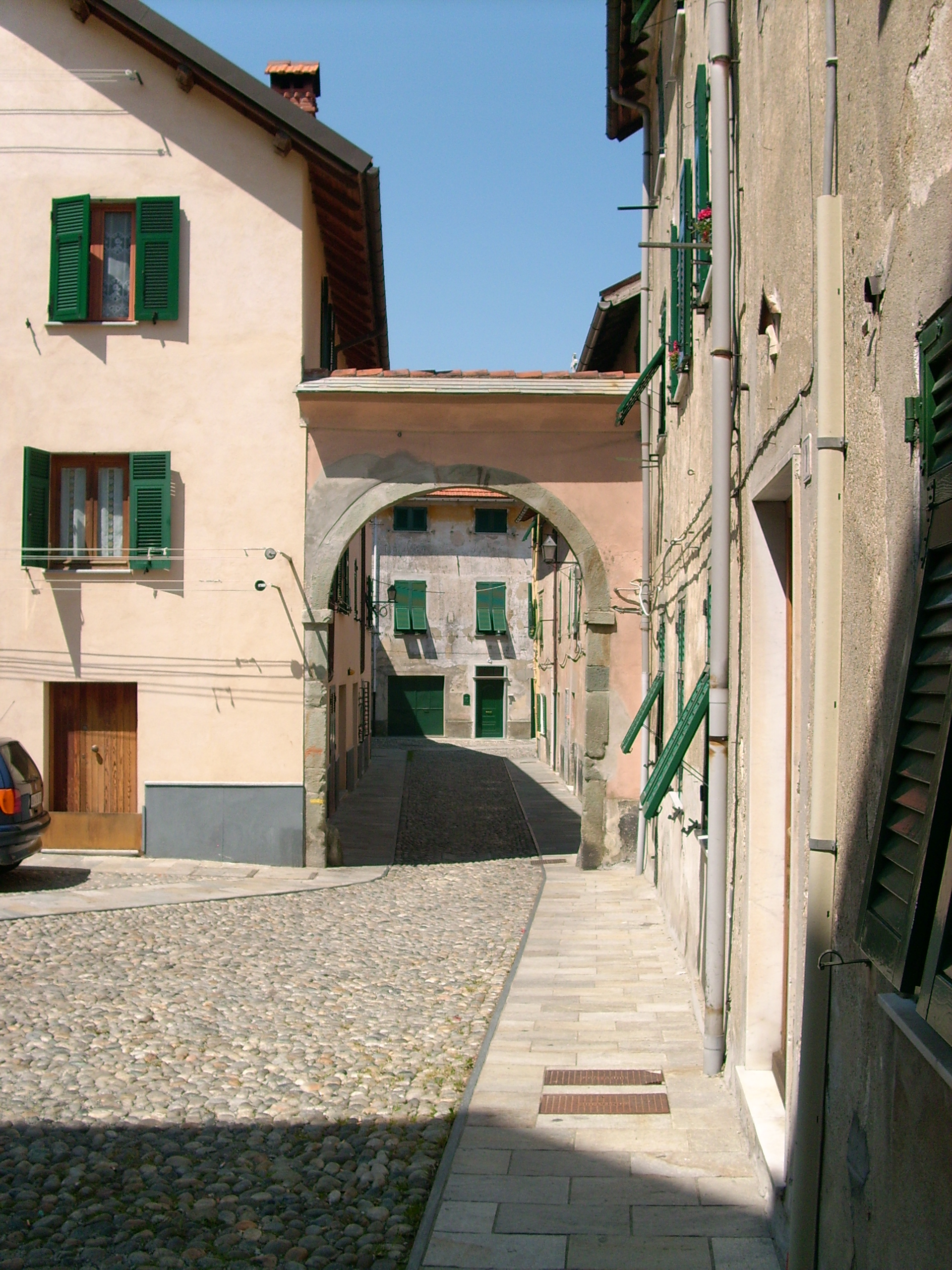 Centro storico di Masone, Liguria, Italia